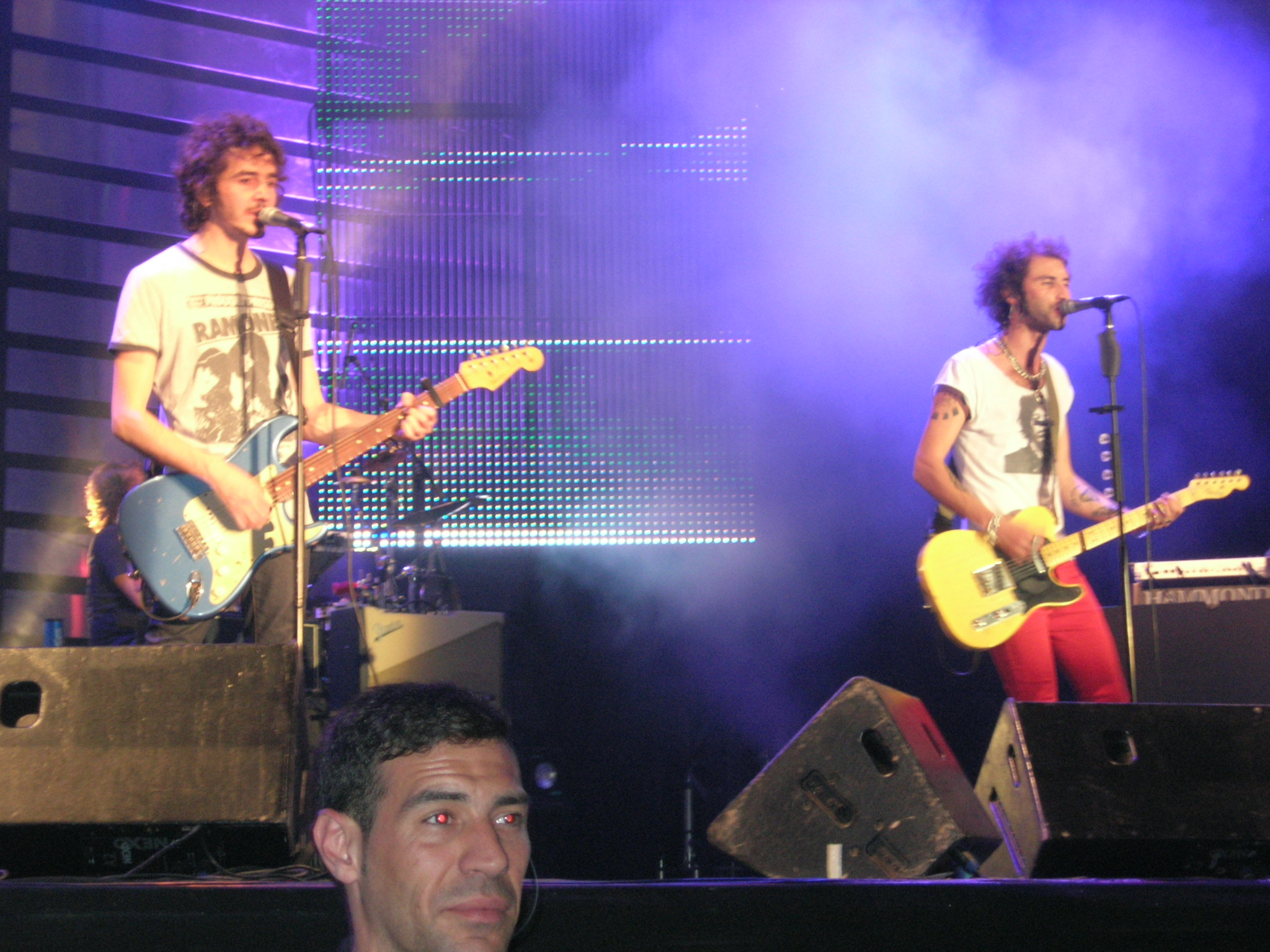 Pereza